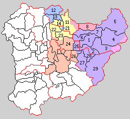 奈良県式上郡・式下郡・十市郡（後の磯城郡）の町村制時点の町村。